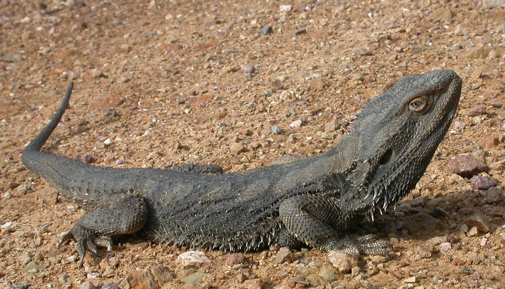 Pogona barbata